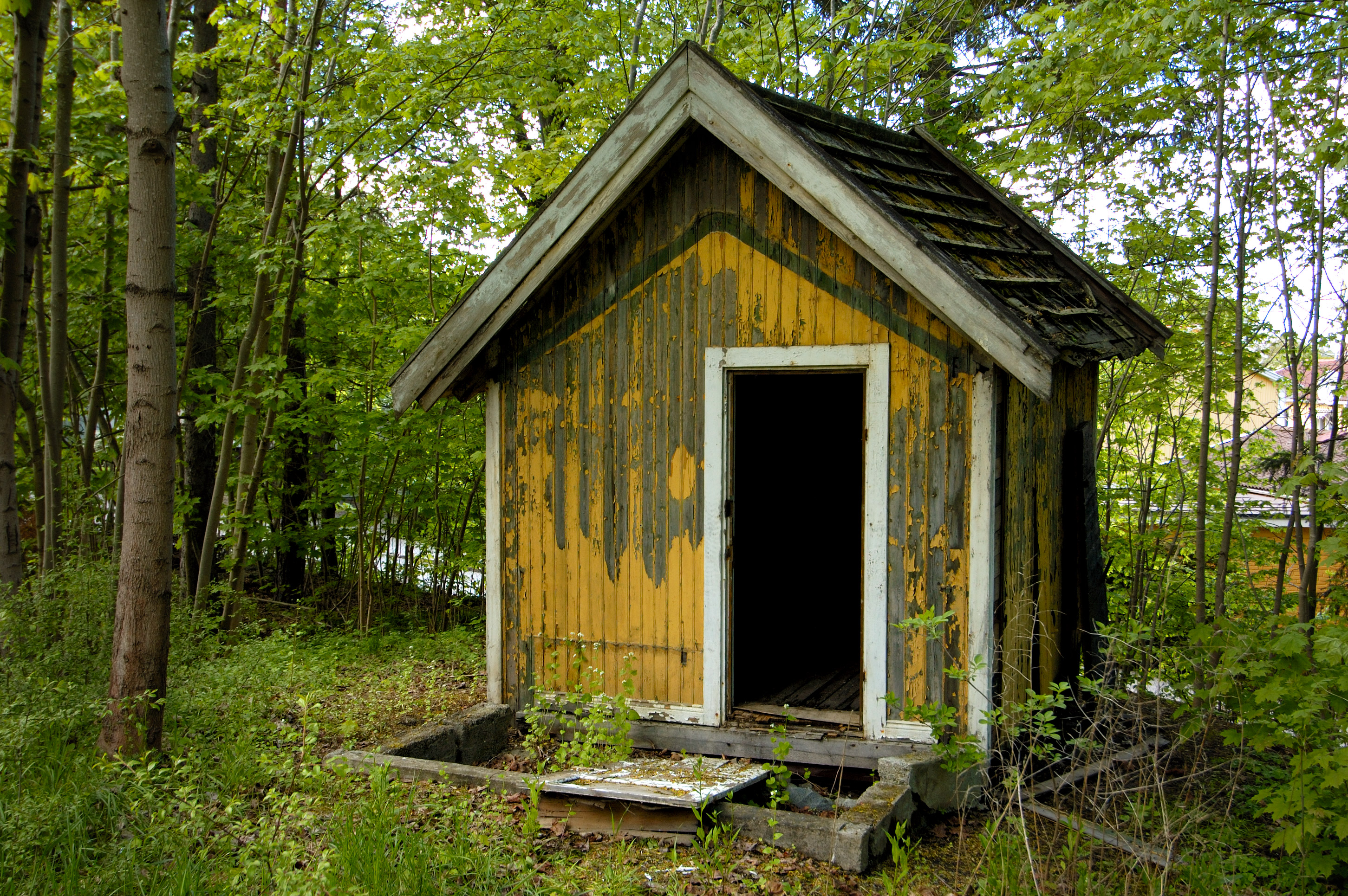 Skjul bakom Bällsta gård i Bällsta i nordvästra Stockholm